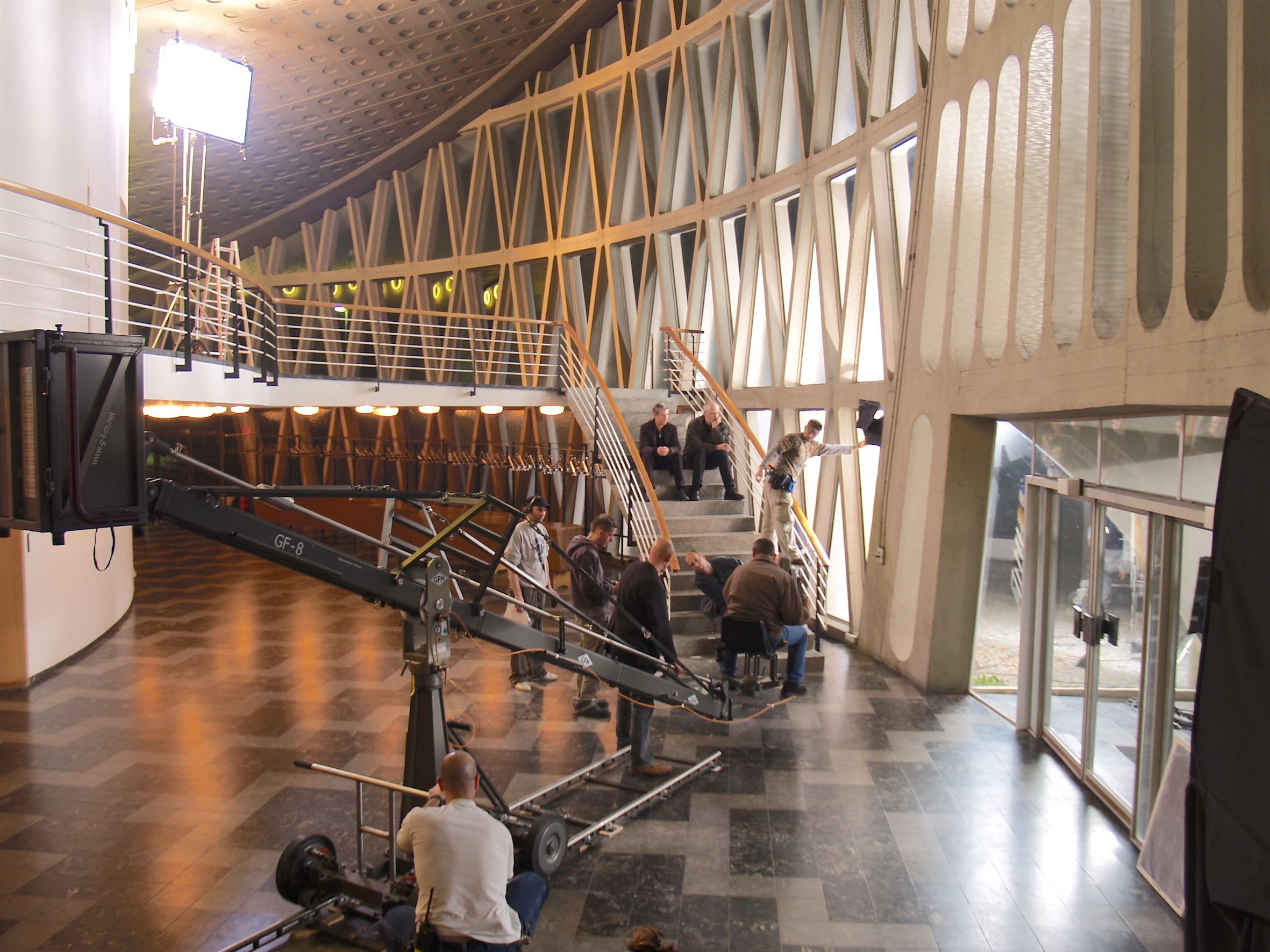 Dreharbeiten zum KInofilm Für den unbekannten Hund" im Feierabendhaus eines Chemiewerks in Hürth bei Köln im Oktober 2005